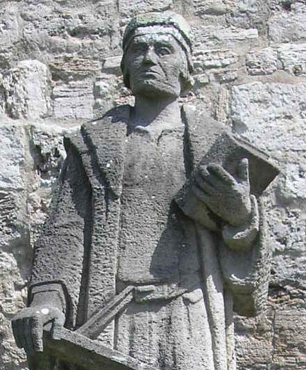 Thomas-Müntzer-Denkmal am Frauentor in Mühlhausen/Thüringen.